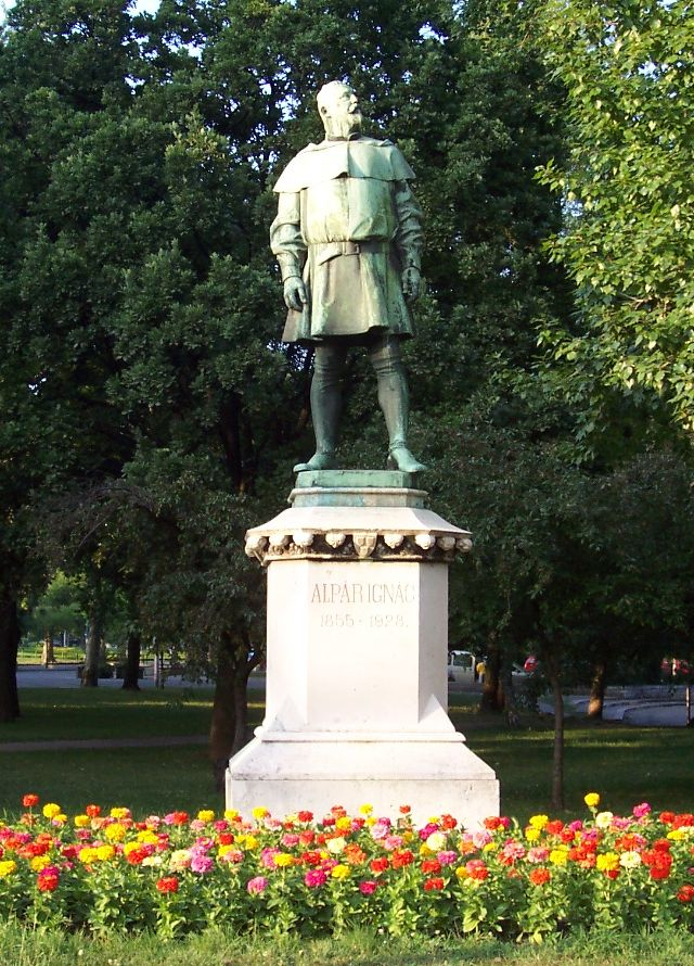 Alpár Ignác szobra a budapesti Városligetben. Telcs Ede szobrászművész és Kotál Henrik építész alkotása (1931)